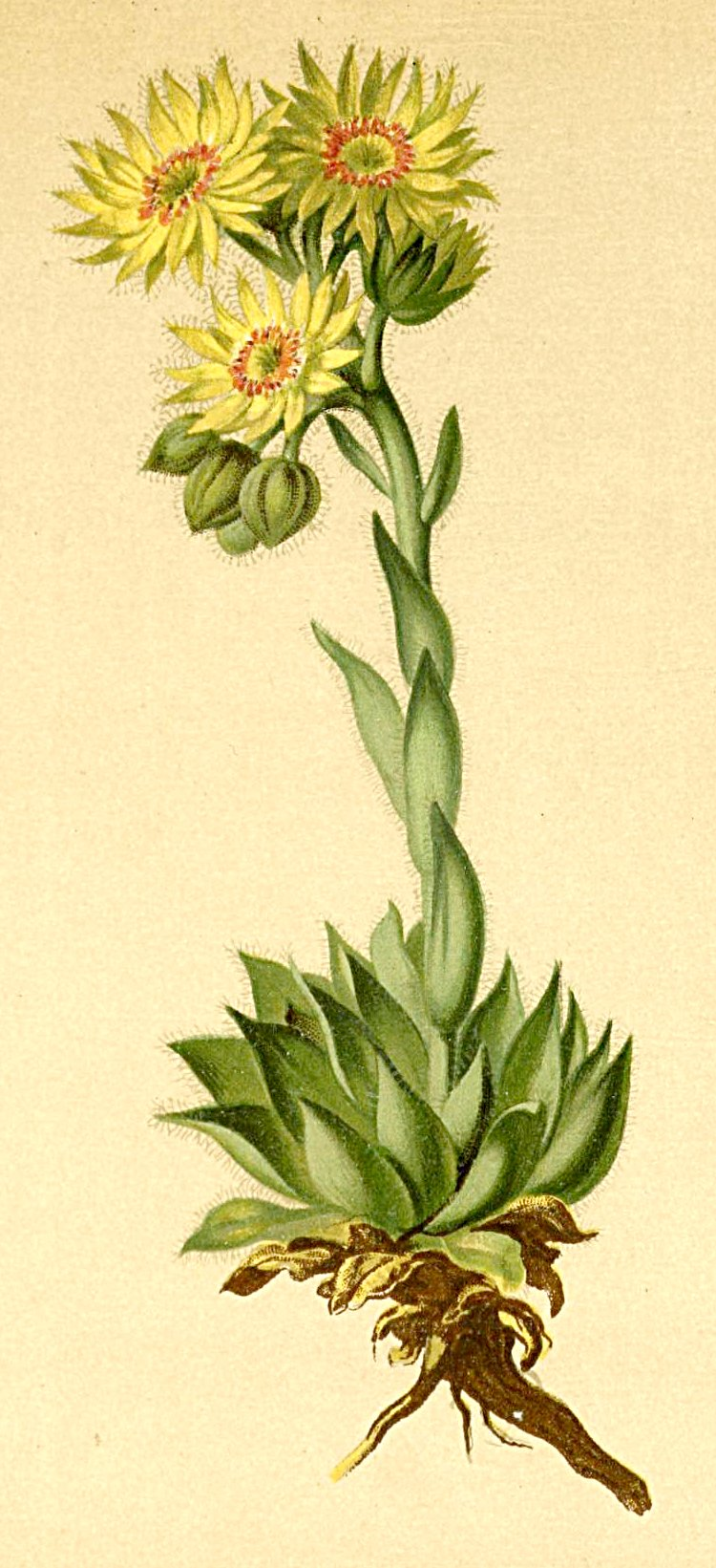 Sempervivum wulfeni